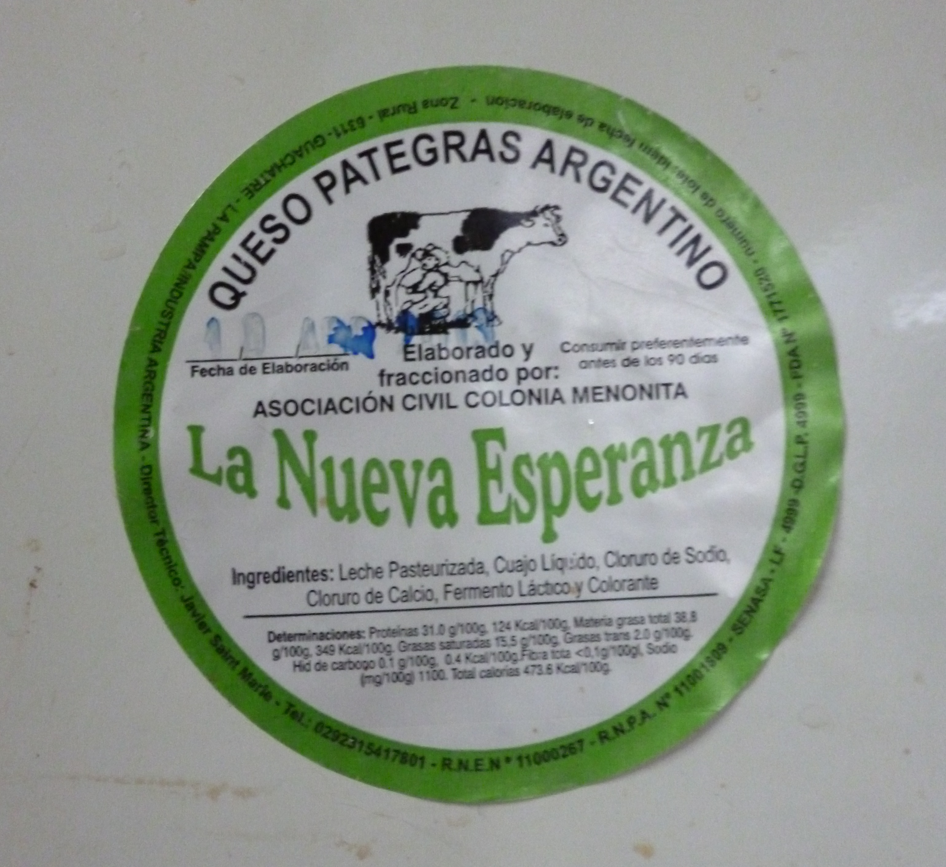 Queso pategrás argentino elaborado por inmigrantes menonitas en la provincia de La Pampa, Argentina